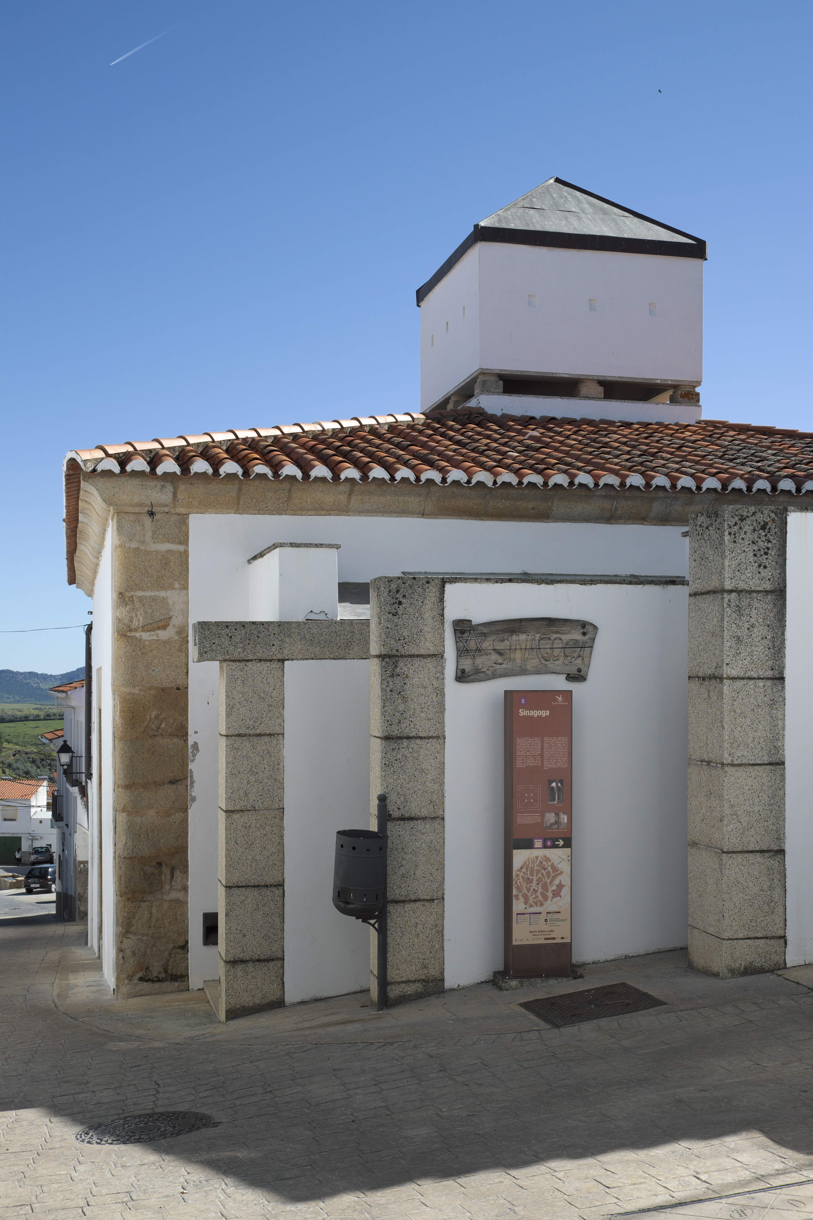 Synagoge im Barrio judío-gótico (Judenviertel) in Valencia de Alcántara in der Provinz Cáceres (Extremadura/Spanien)